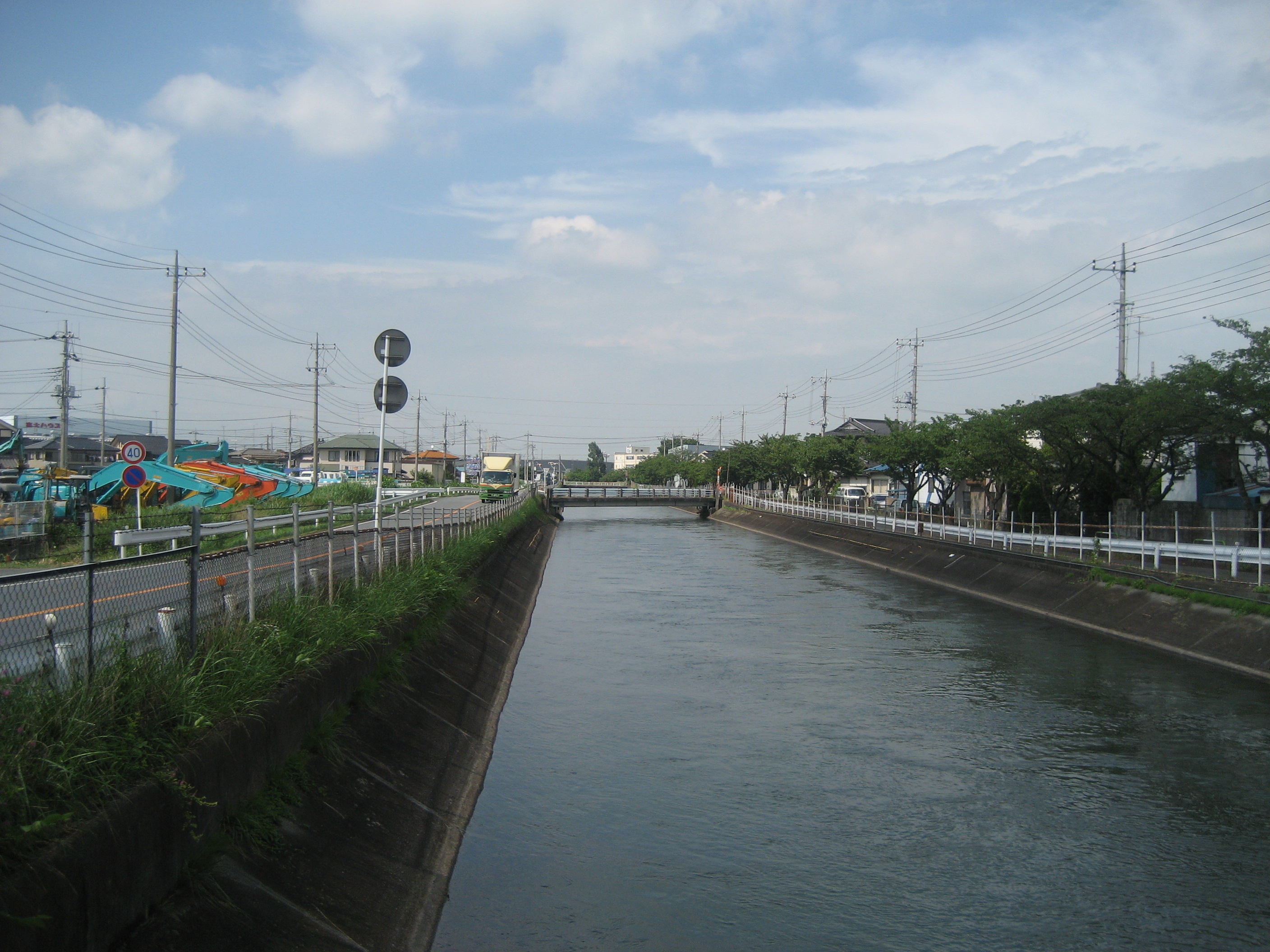 武蔵水路行田市内